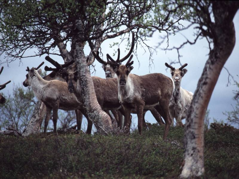 Rentiere in Jämtland, Schweden; reindeers in Jämtland, Sweden